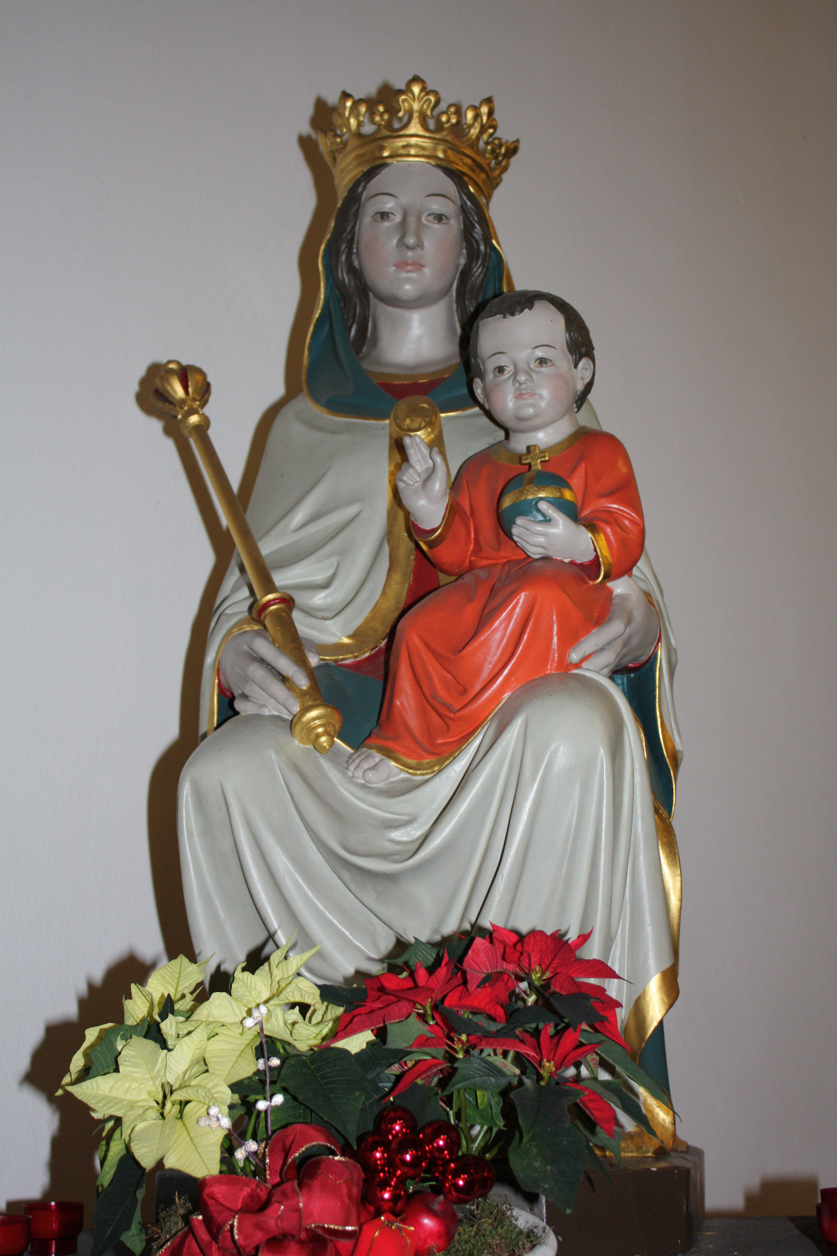 St. Johann Baptist Kendenich, Maria Königin (erste Hälfte des 19. Jh.)